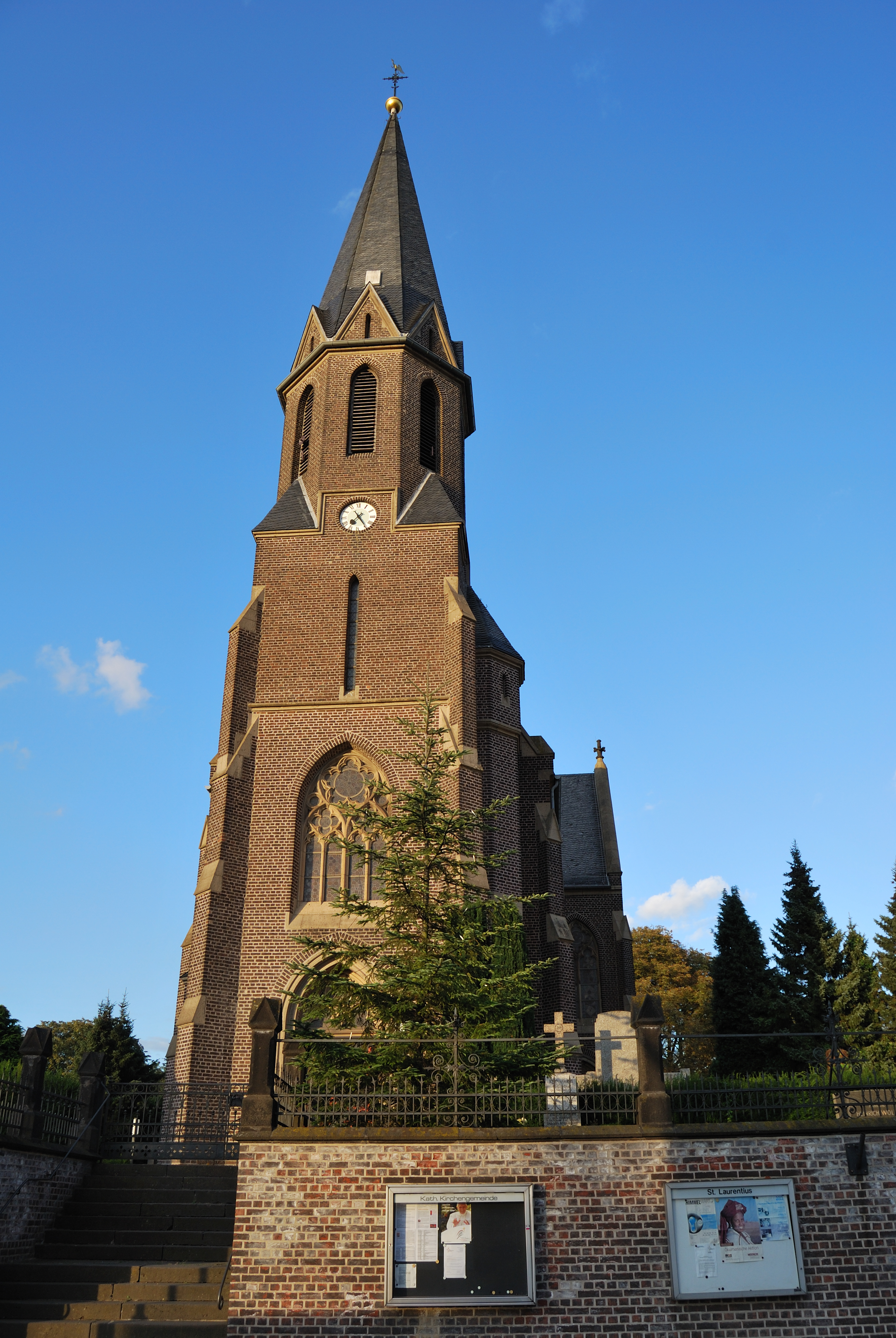 Denkmalnummer 12; Windmühlenstraße 19